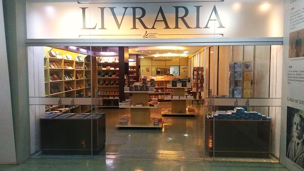 Libroservo de Brazila Spiritisma Federacio (interne de ties sidejo en Braziljo, Brazilo)